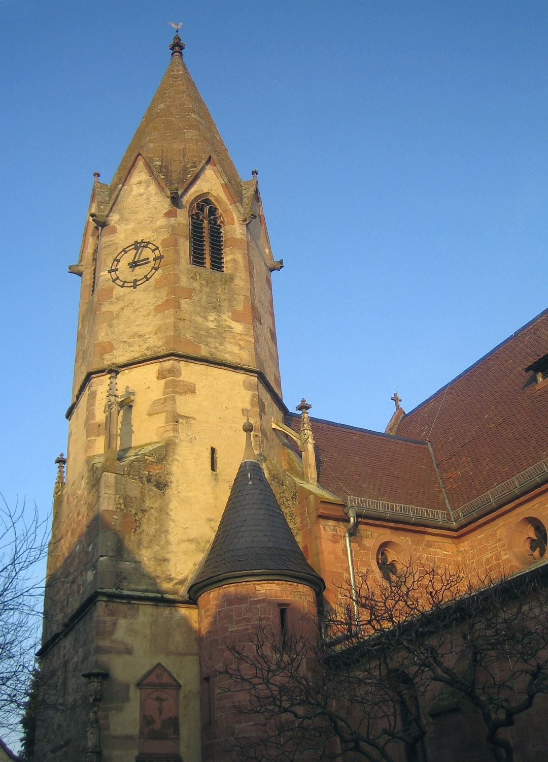 Kirche St. Cyriakus in Niedernberg, Bayern, Deutschland